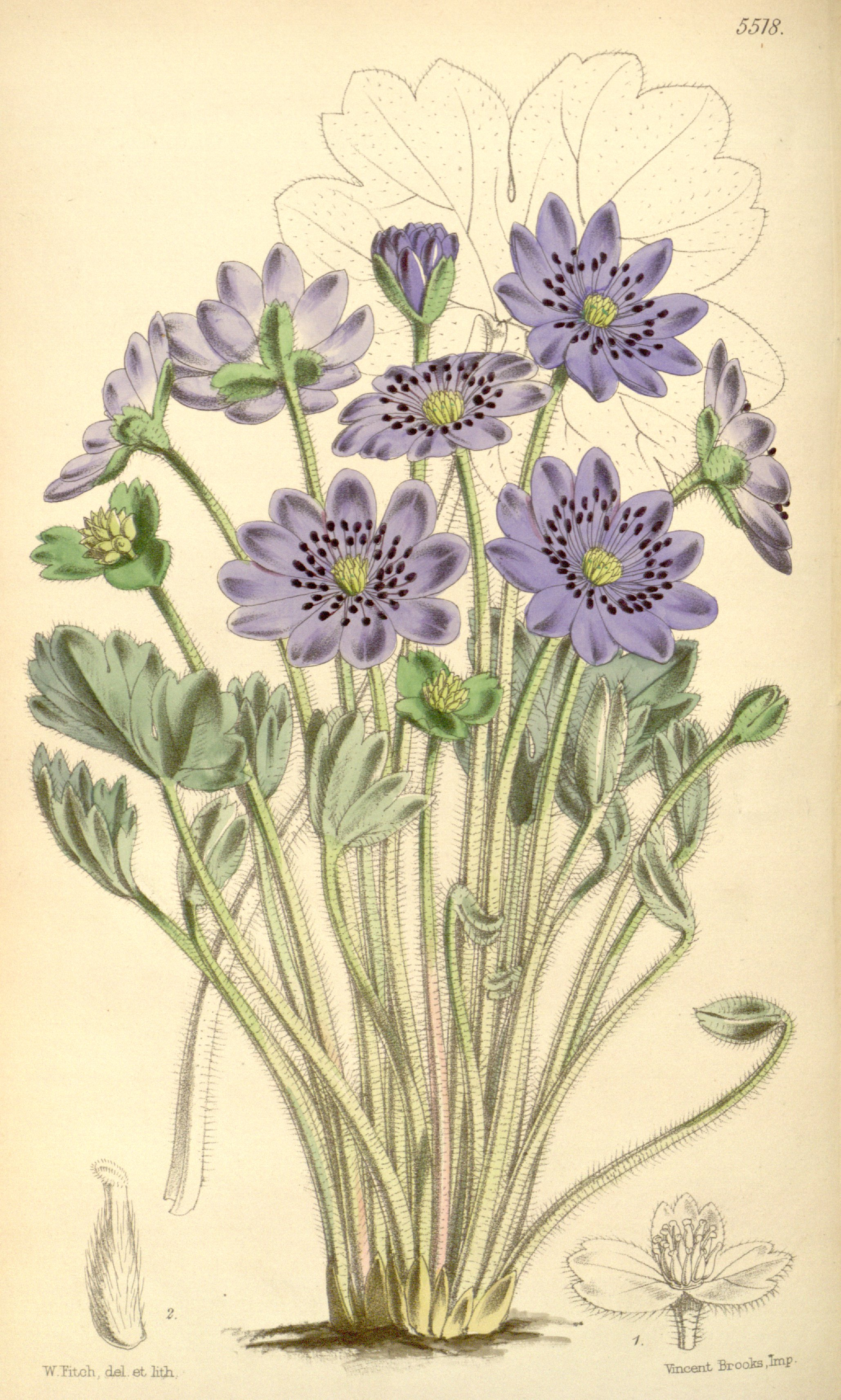 Anemone angulosa = Anemone transsilvanica (Fuss) Heuff.